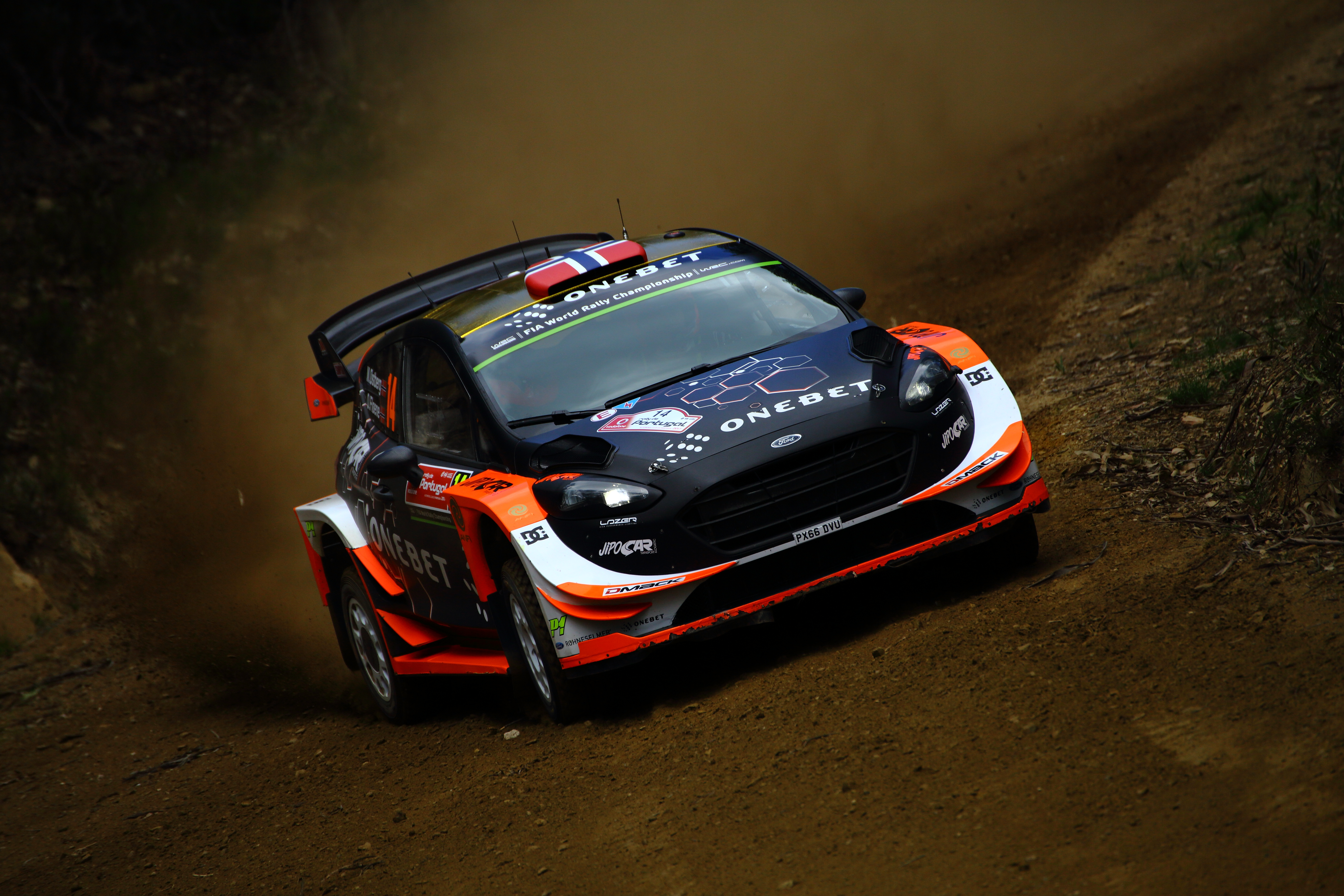 2017 Rally Portugal